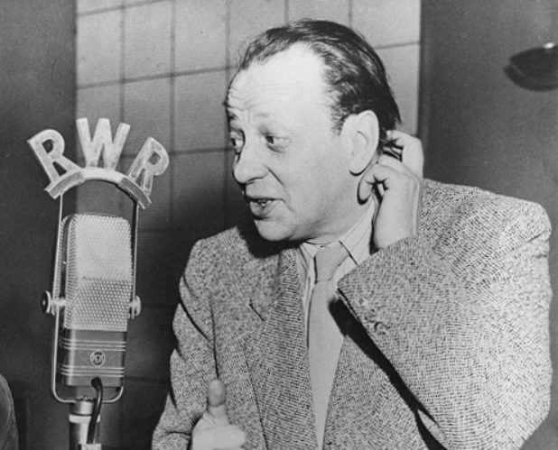 Ernst Waldbrunn im Wiener Studio des Senders Rot-Weiß-Rot.